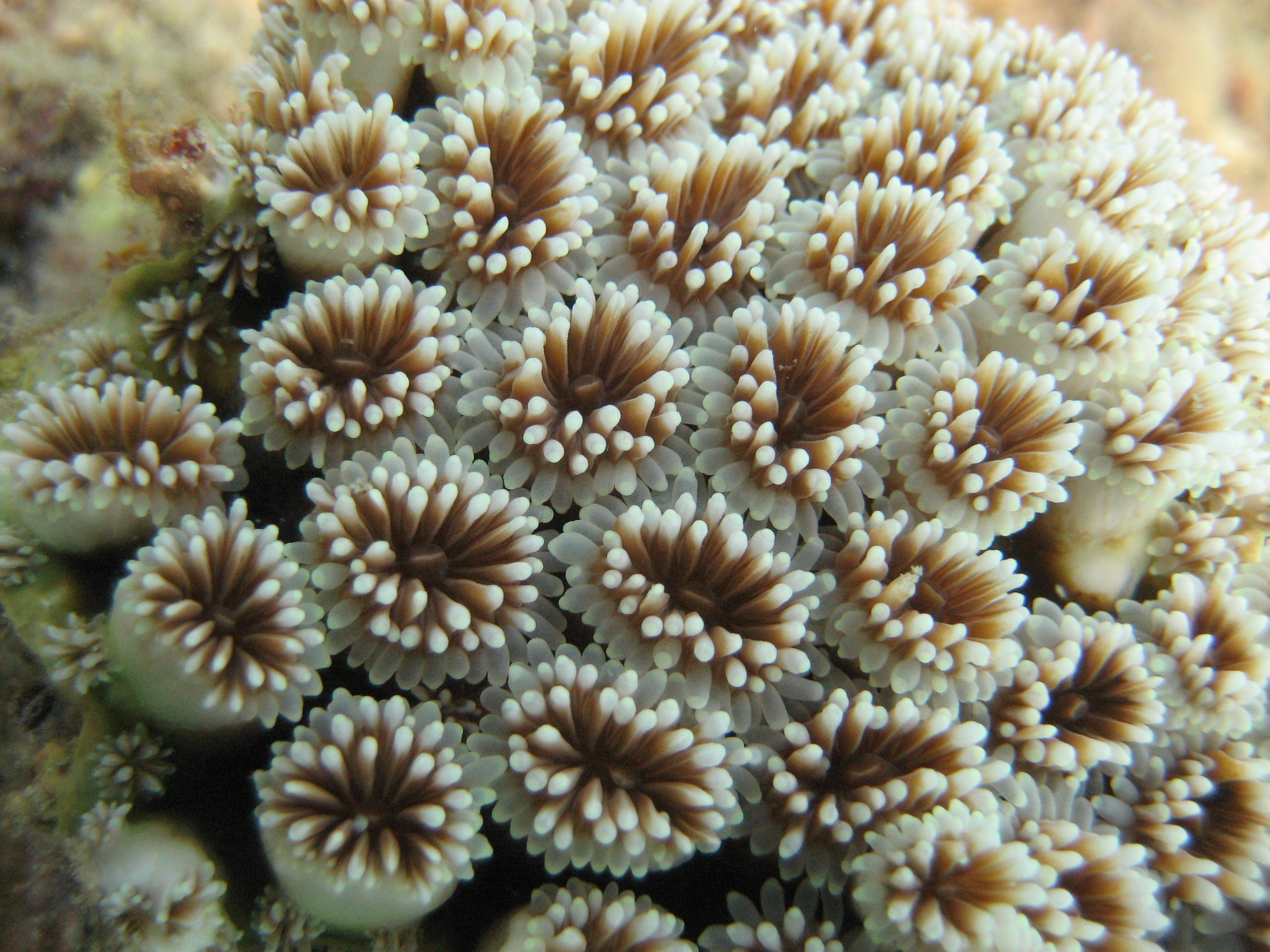 Coral detail